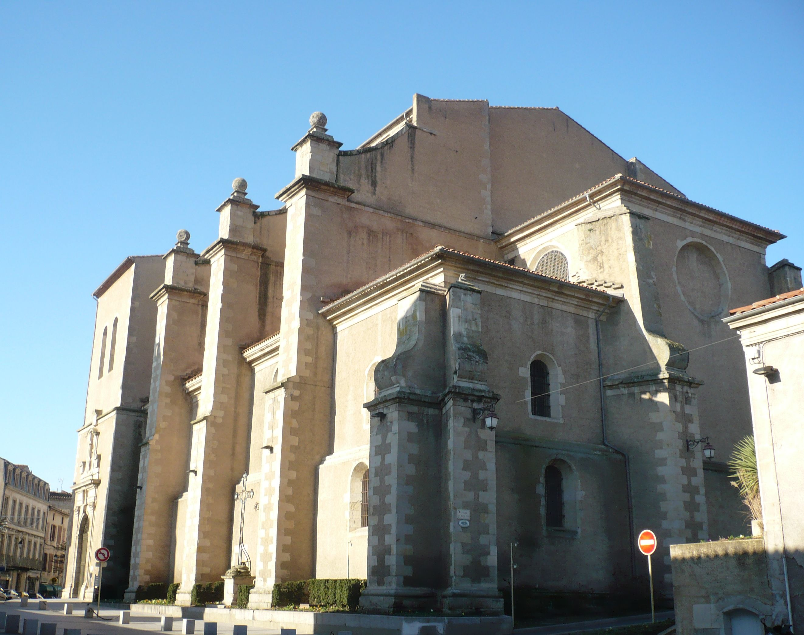 Castres